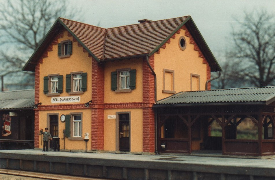 Foto nach einem weitestgehend authentischen Modell.